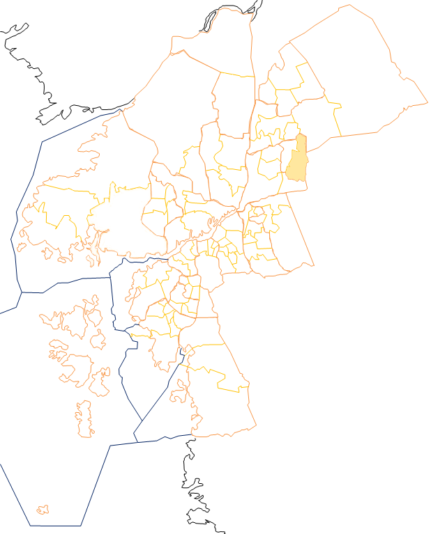 Karta som visar primärområdes belägenhet i Göteborg